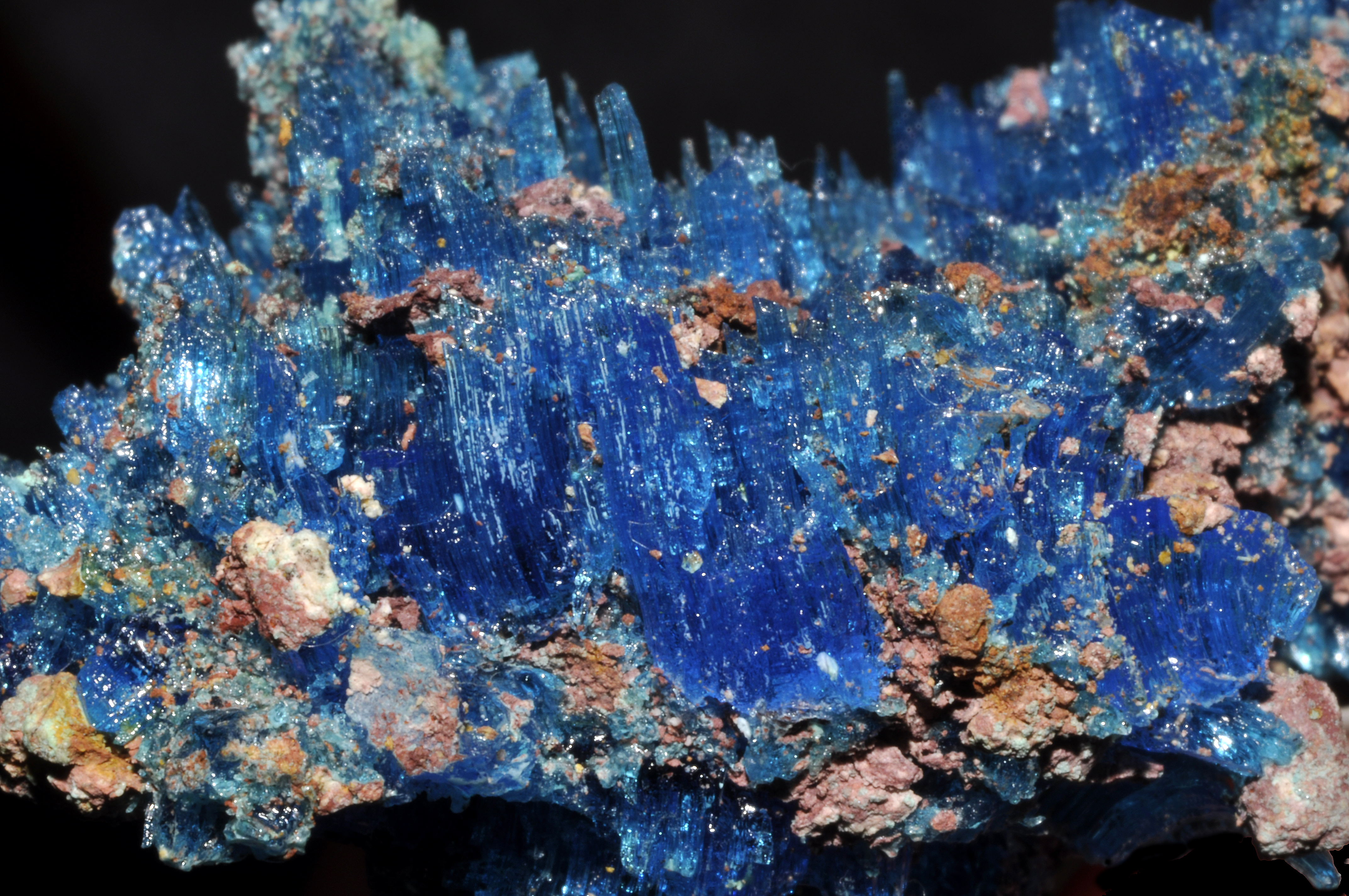 cristaux de chalcanthite